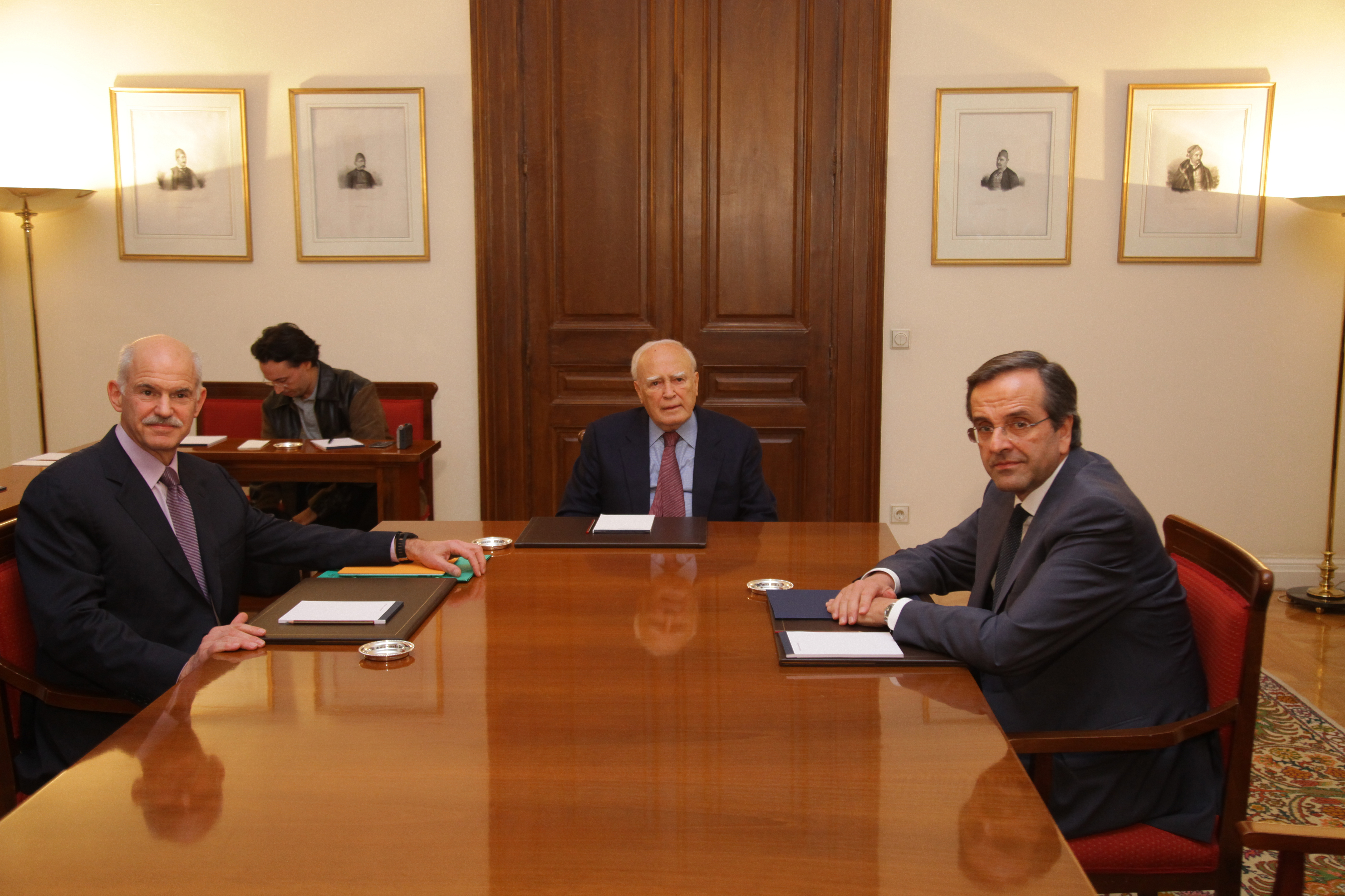 Συνάντηση με τον Πρόεδρο της Δημοκρατίας, Κάρολο Παπούλια Προεδρικό Μέγαρο 6 Νοεμβρίου, 2011